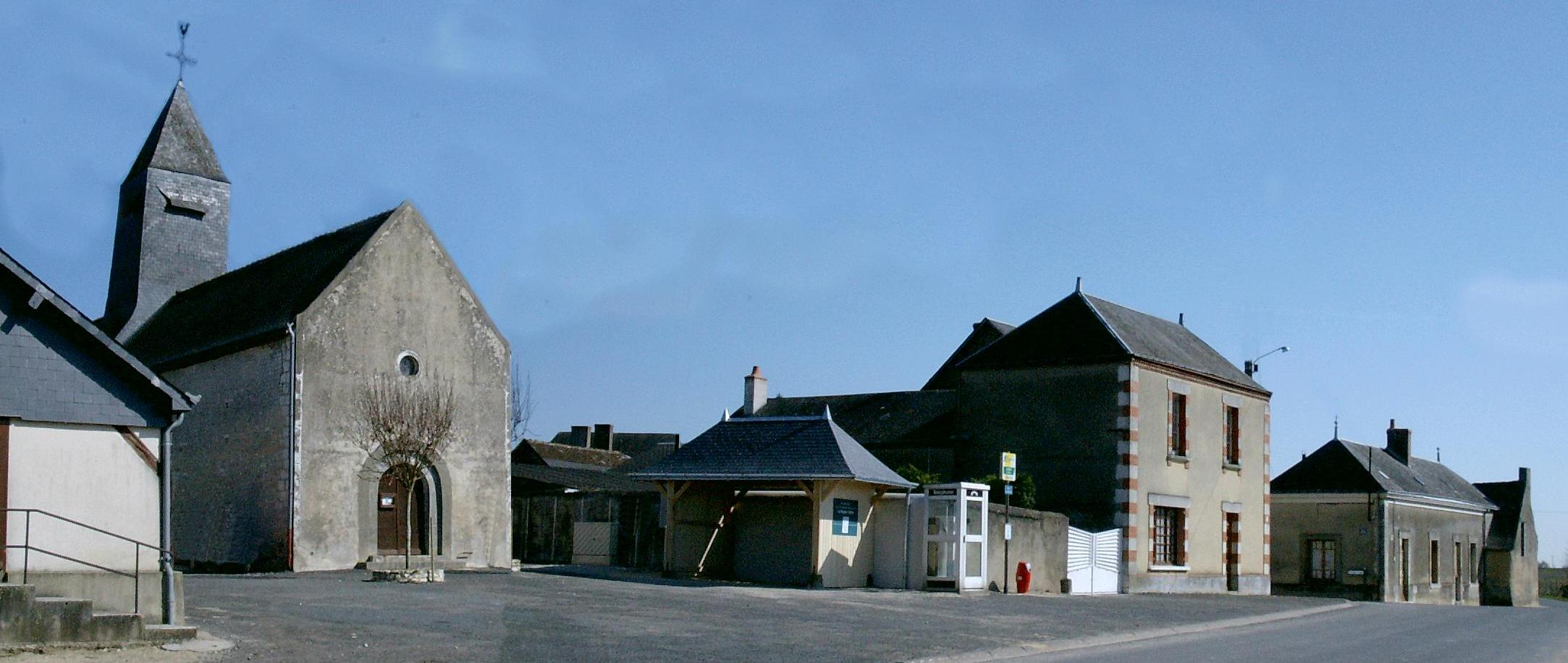 La place de Lublé et son église